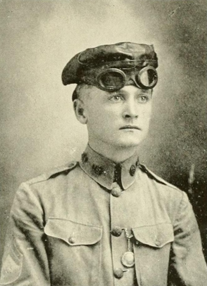 Sergeant Vernon Lee Burge